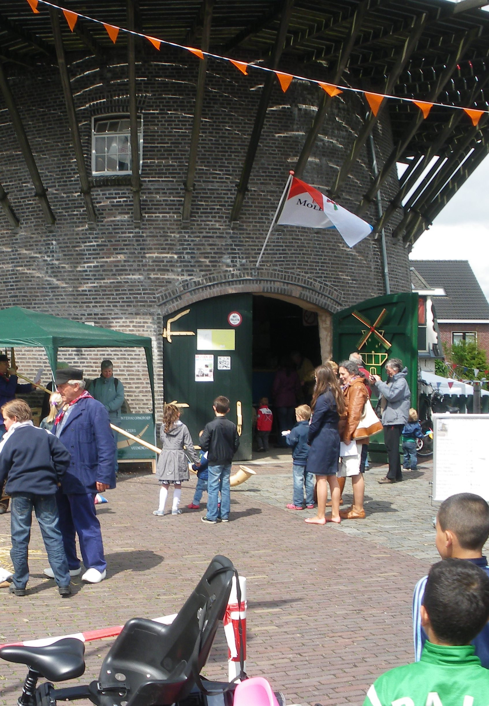 De Hollandsche Molen wil zoveel mogelijk mensen laten genieten van molens. (Foto De Hollandsche Molen)